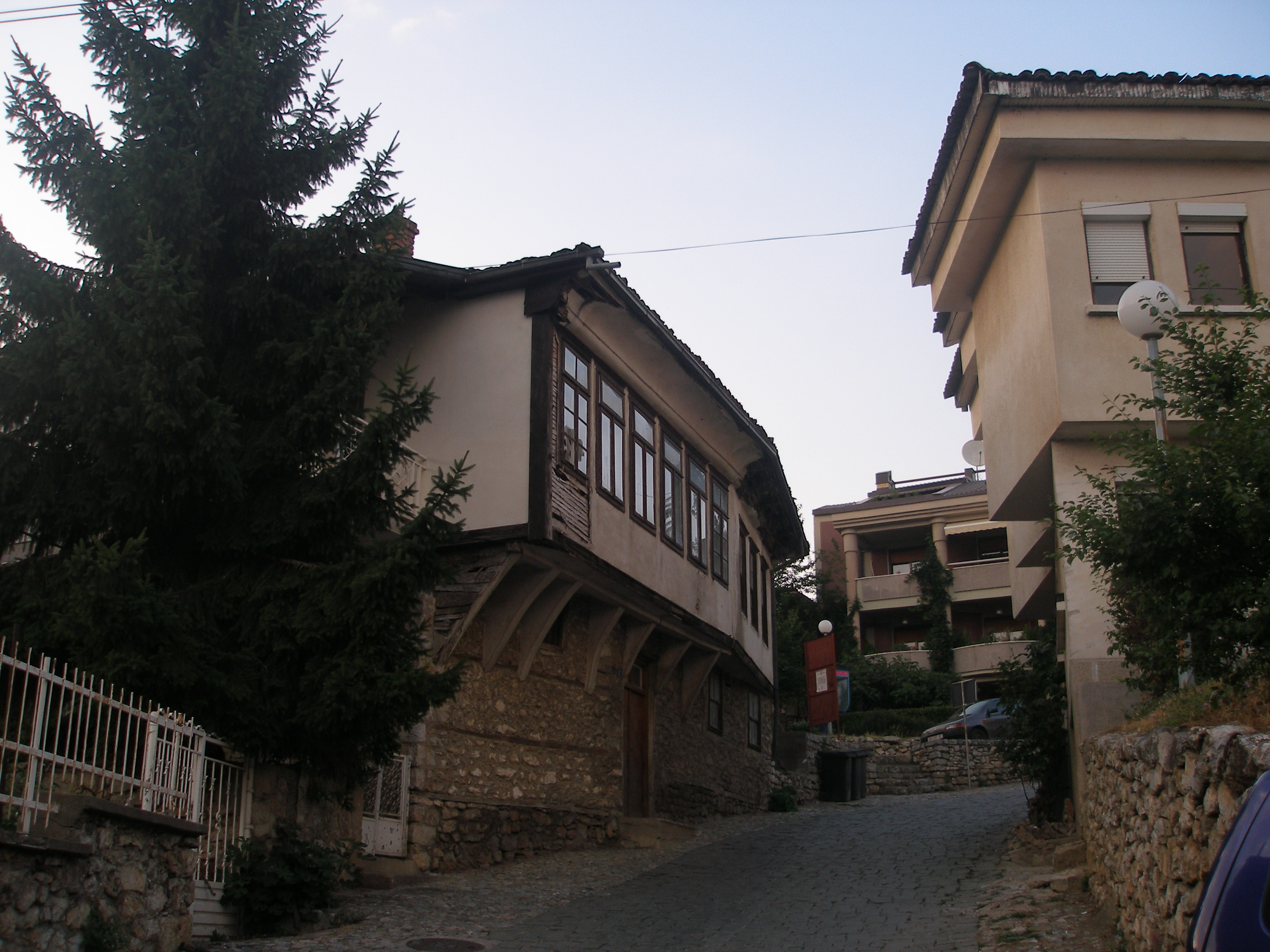 Ozke Ohridske ulice (Sokaci),mestno jedro ohrida je pod Uneskovo zaščito. Poletje 2008